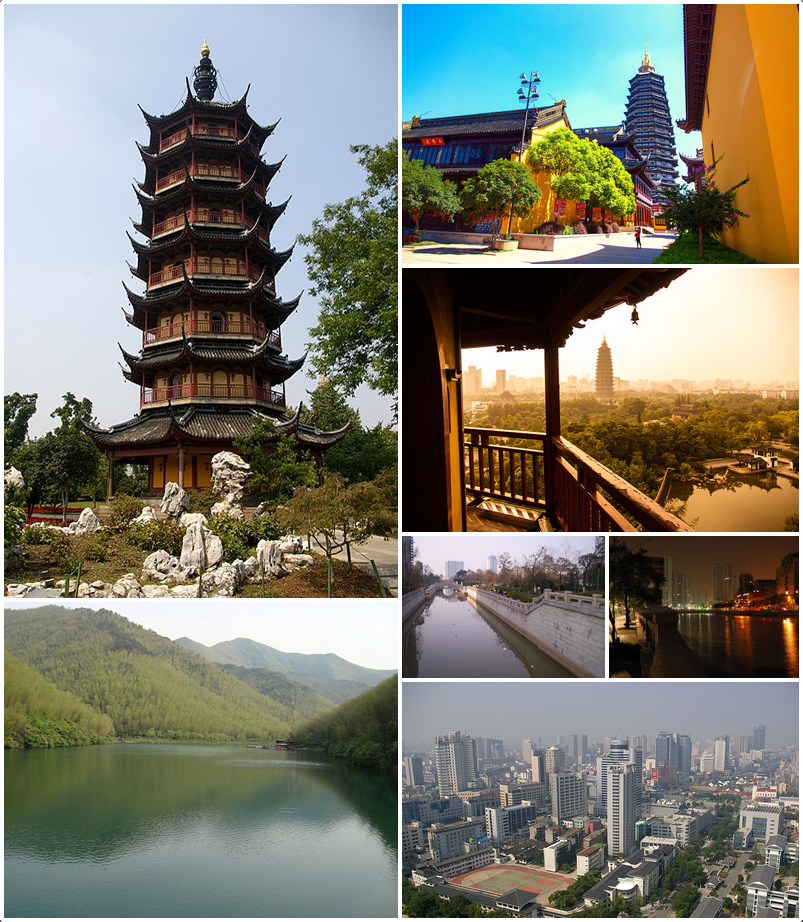 常州市风光 Czpark File:20090919_Changzhou_Wenbi_Pagoda_5429.jpg File:南山竹海之静湖.JPG File:Changzhou_4.JPG File:ChangzhouOldCityDistrict.jpg-cn